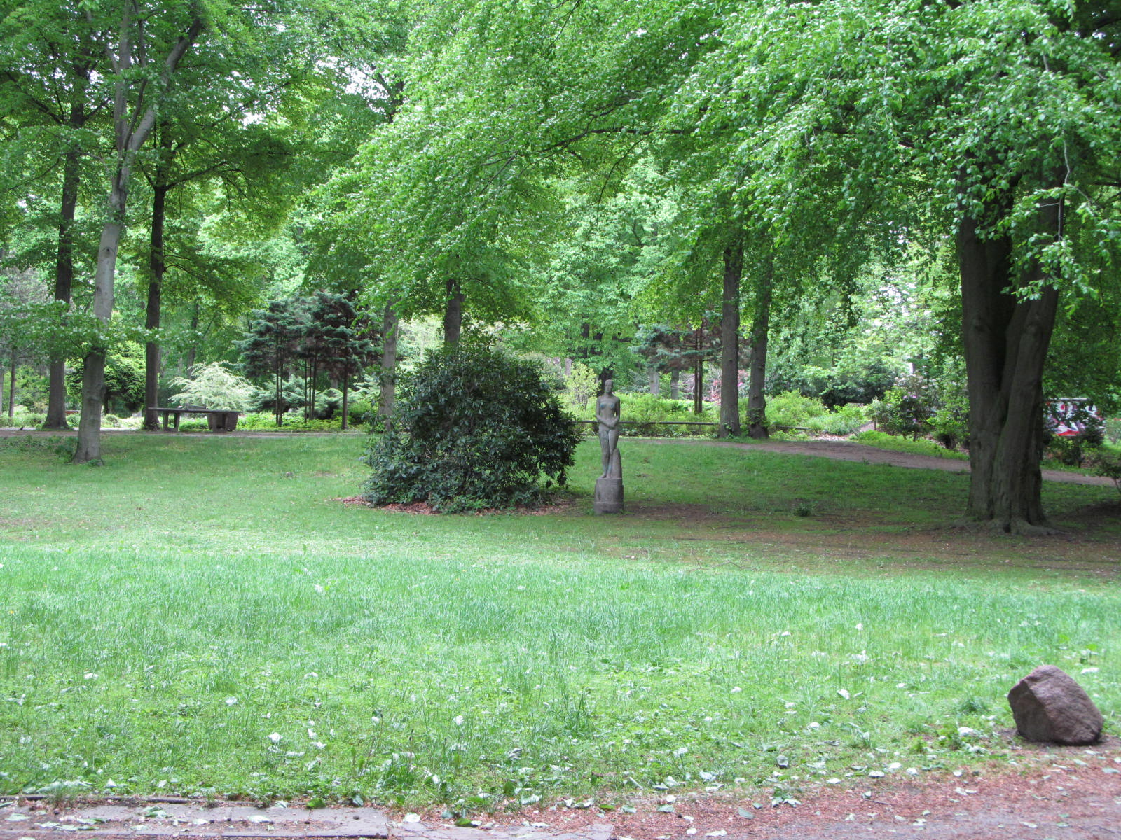 Hammer Park in Hamburg-Hamm, Rondell mit "Jungfrau" von Paul Hamann This is a photograph of an architectural monument.